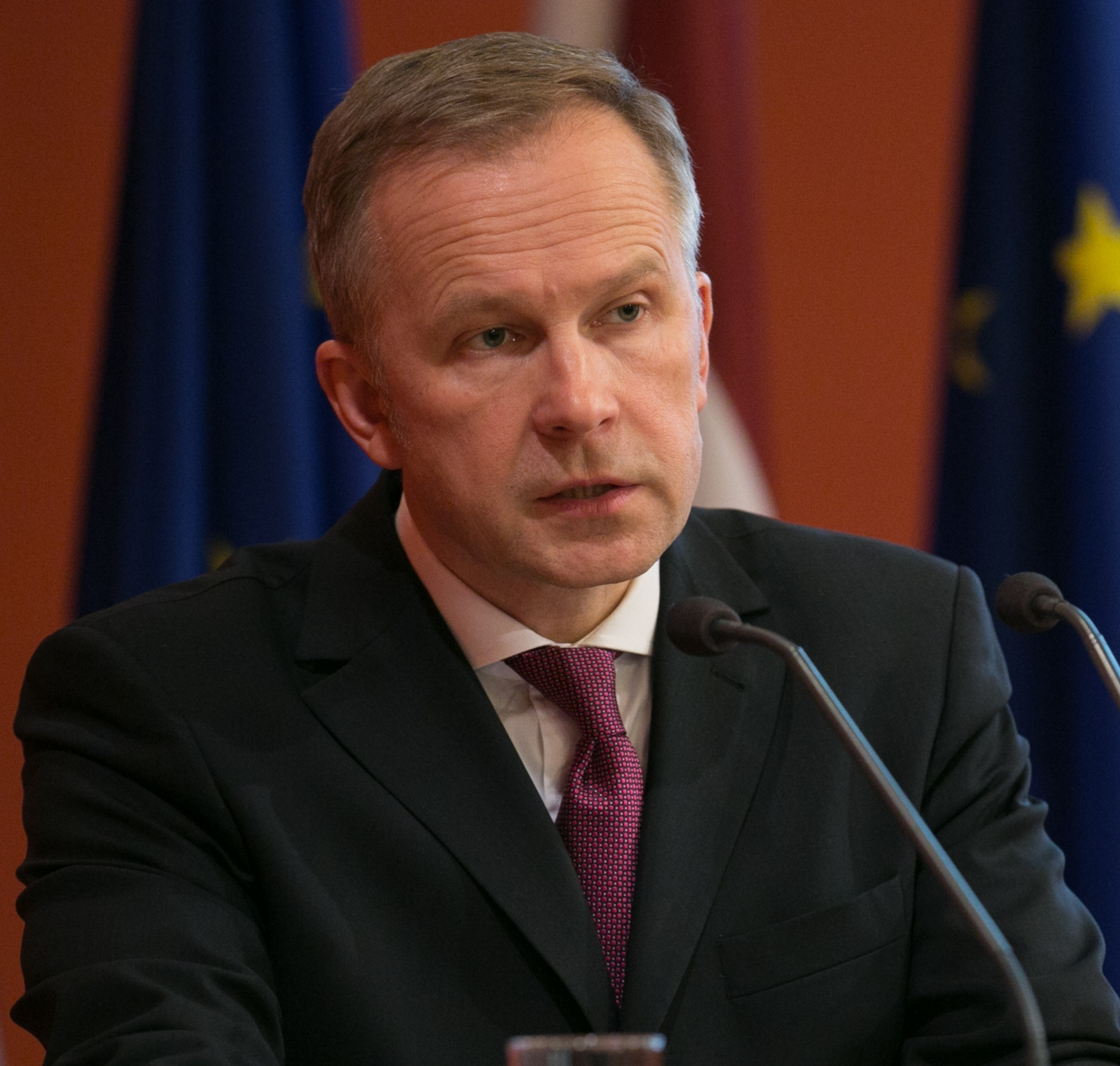 Latvijas Bankas prezidents Ilmārs Rimšēvičs